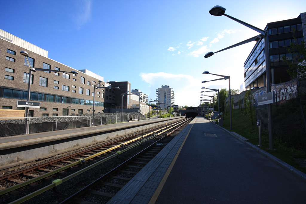 Hasle T-banestasjon sett fra enden på Spor 2 i nord. I billedretning mot Carl Berners Plass.